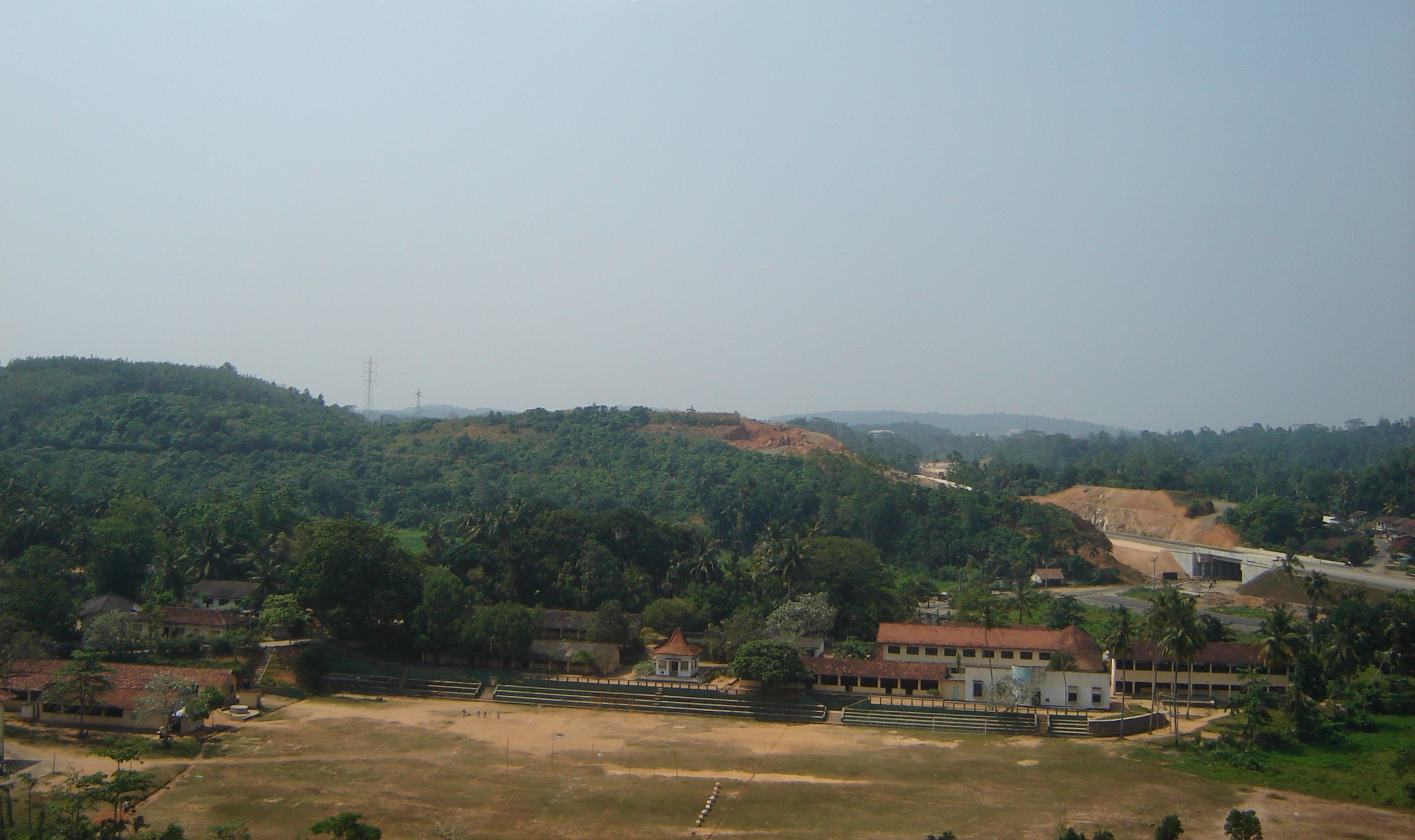 සිංහල: උපනන්ද විද්‍යාලය